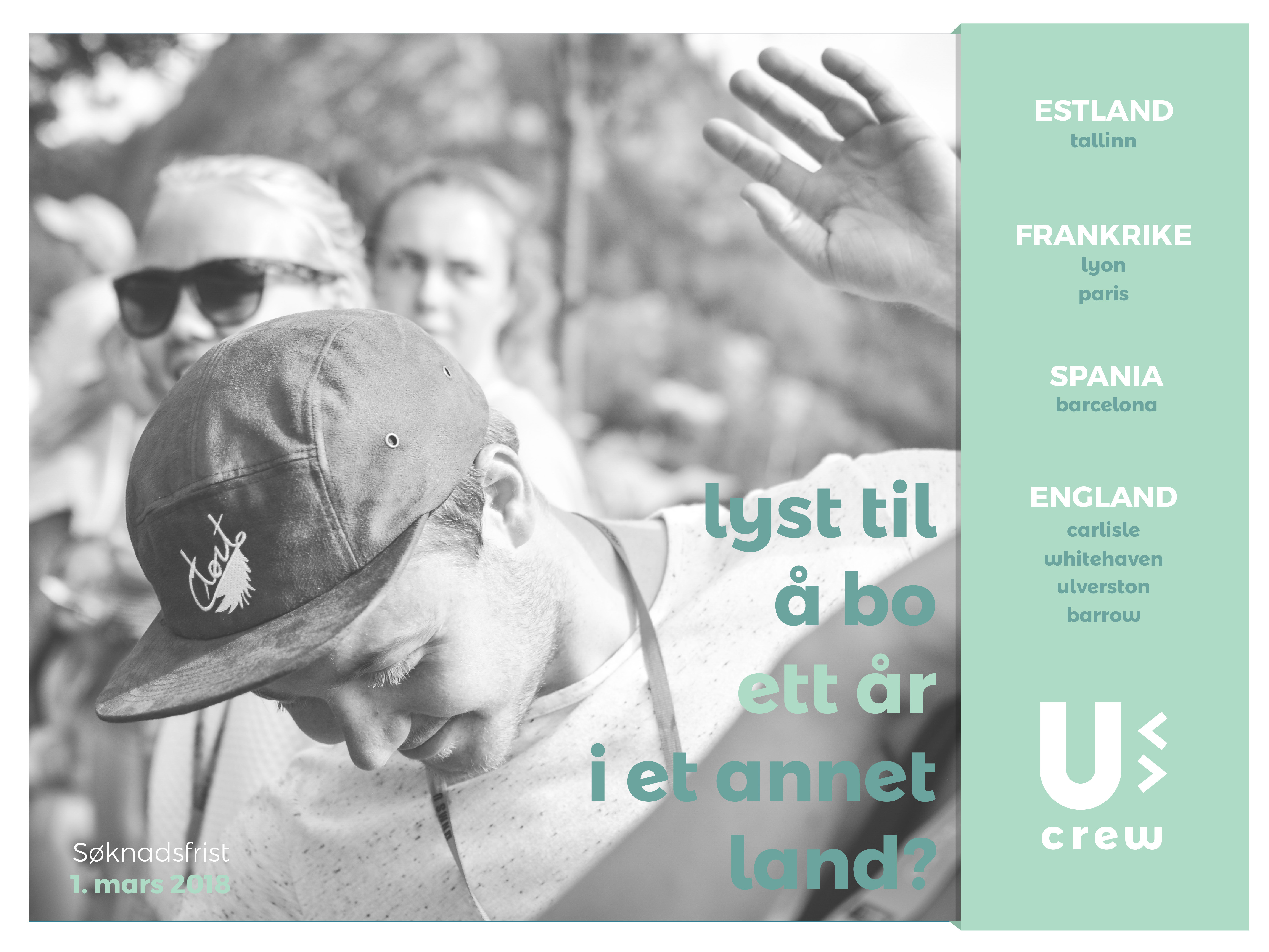 Ucrew - ettårig utveksling i Europa